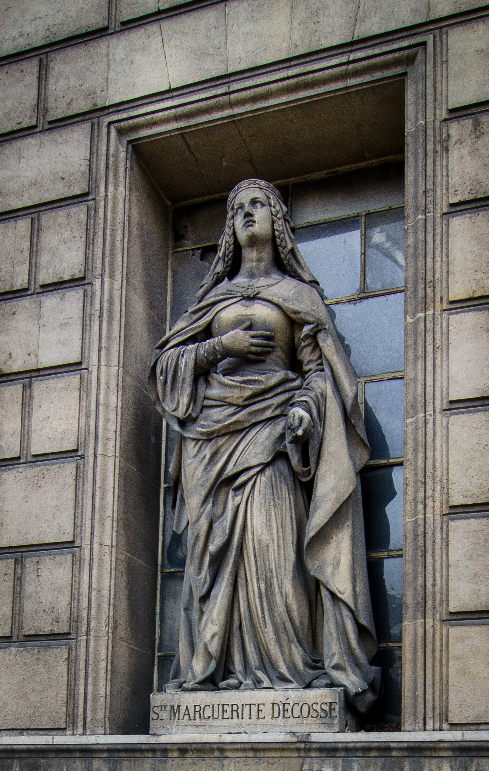 Author Creator:François Augustin CaunoisDescription